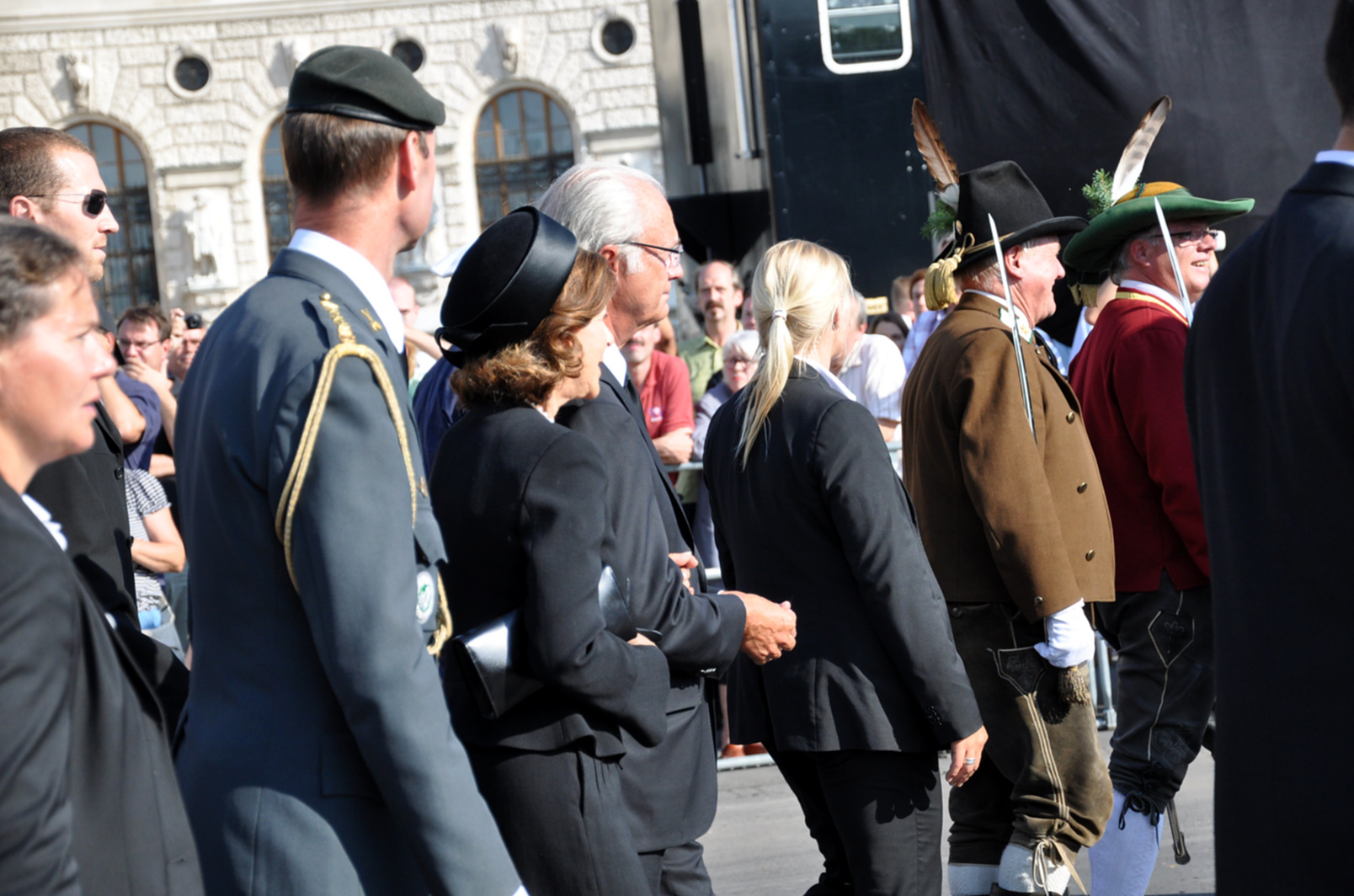 Das schwedische Königspaar: Carl Gustaf und Königin Silvia